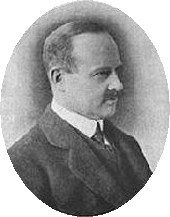 Arkitekt Albert Lilienberg